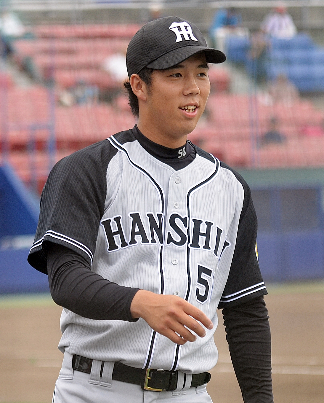 阪神タイガースの青柳晃洋投手